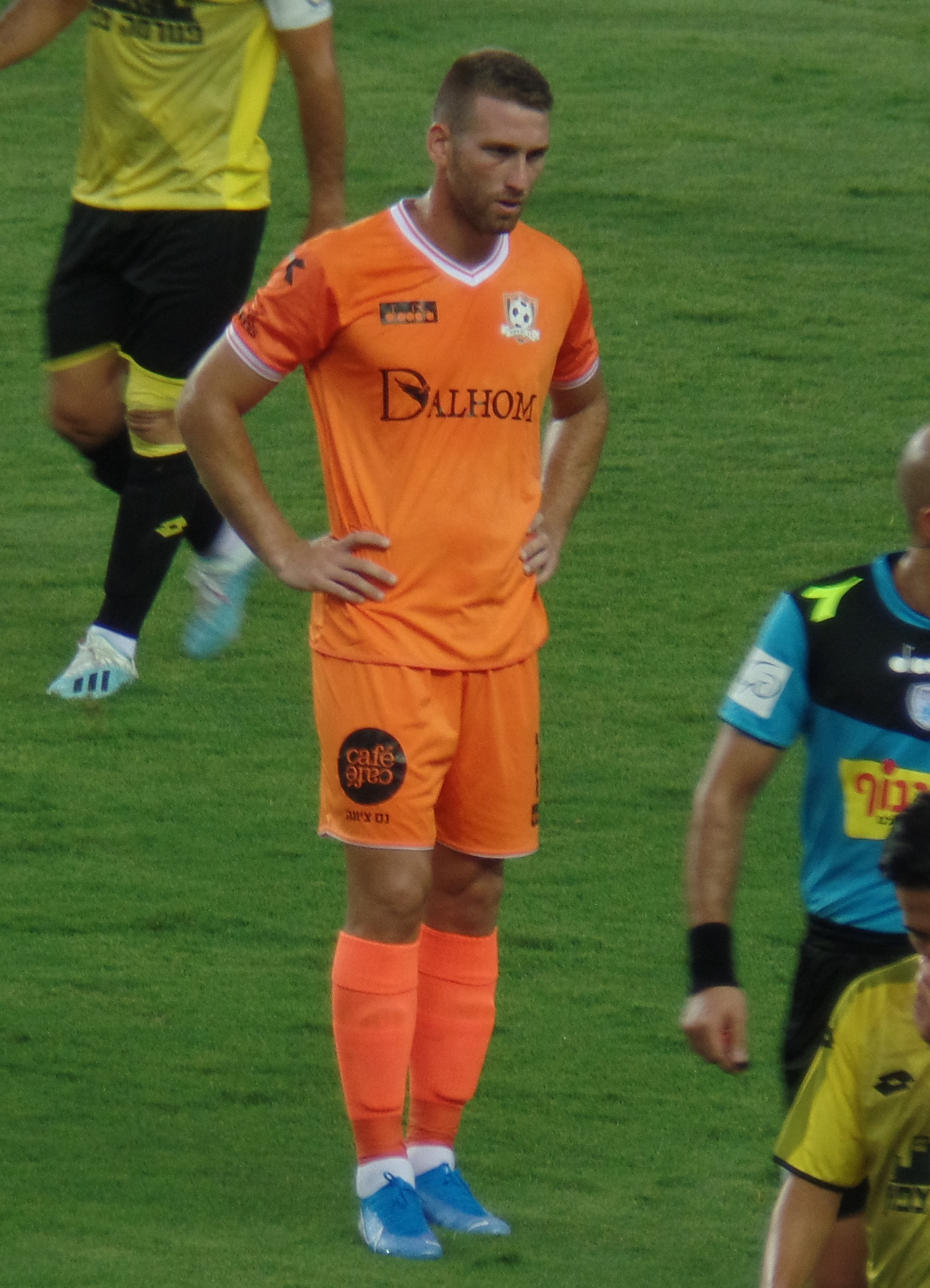 עדן שרם במדי סקציה נס ציונה 2019